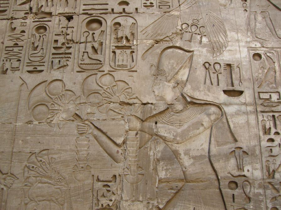 Relief représentant le pharaon Ramsès IV (Ramesses IV)- Temple de Khonsou à Karnak - XXe dynastie égyptienne